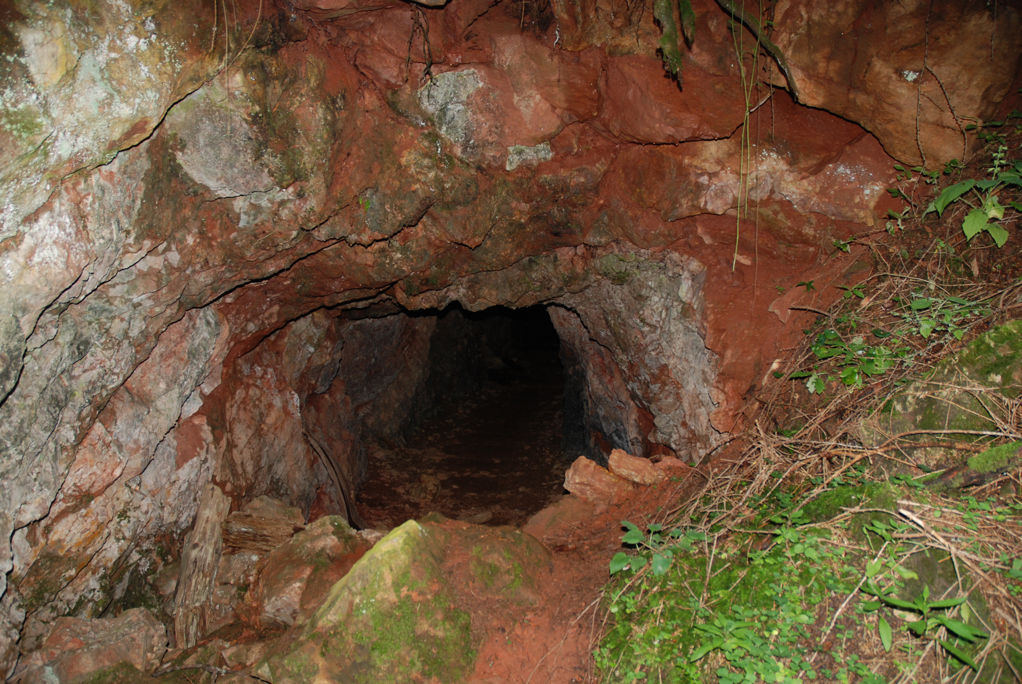 Mundloch im ehemaligen Bergbaurevier Gräser im Reichraminger Hintergebirge, Oberösterreich, Österreich